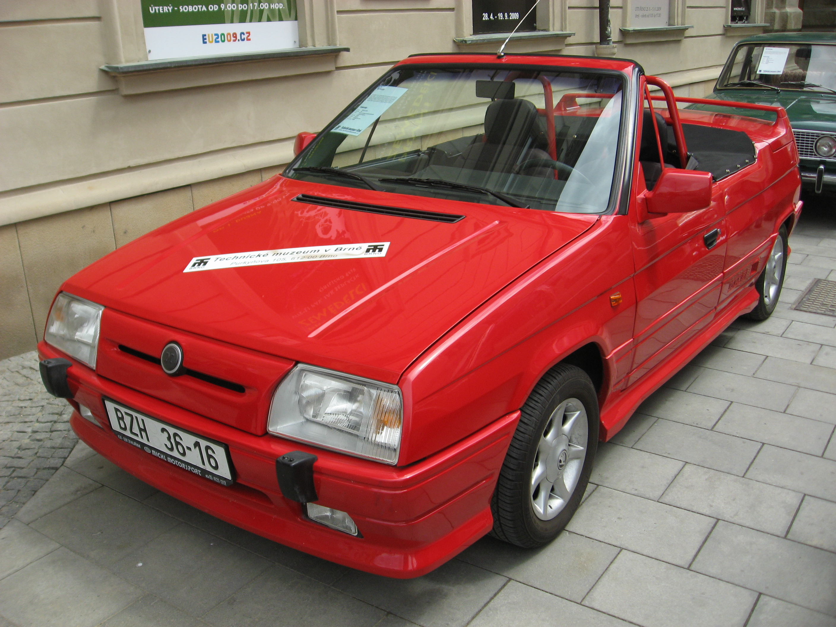 Brno, 140 let MHD